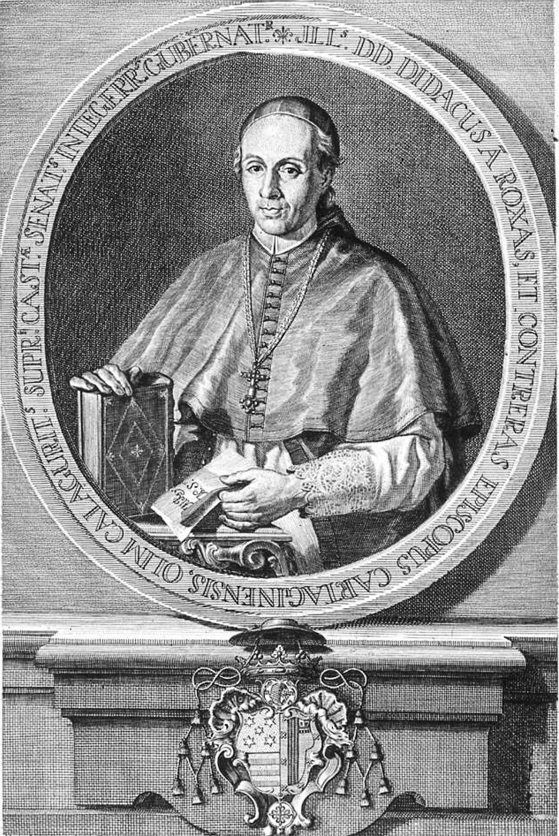 Obispo Diego de Rojas y Contreras. Inscripción: "Ills. D. D. Didacus a Roxas et Contreras Episcopus Cartaginensis Olim Calagurrits. Supri. Castae. Senats. integerrs. Gubernatr"